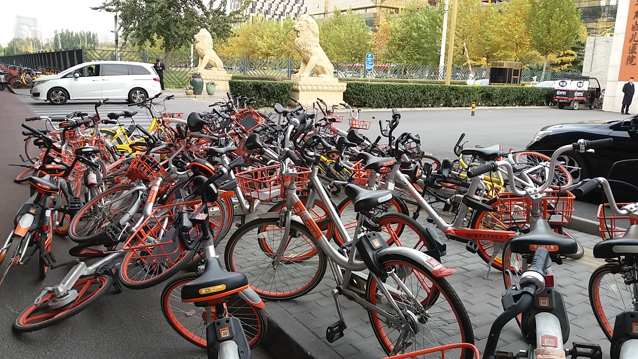 2017年11月8日北京东四环金长安大厦前堵满人行道的共享单车